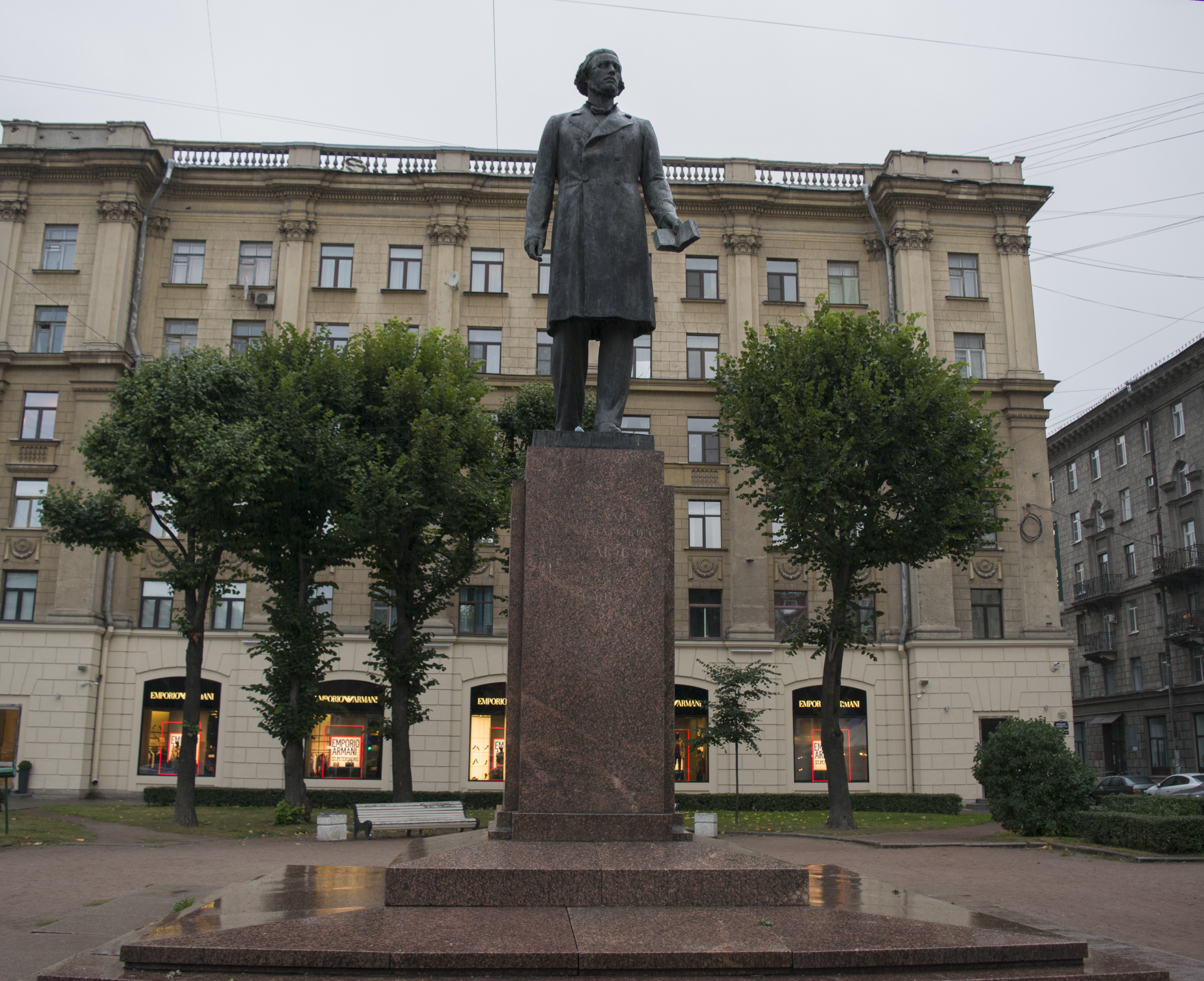 Памятник публицисту Добролюбову Н.А.: Большой проспект Петроградской стороны, у дома 34-36, Петроградский район, Санкт-Петербург